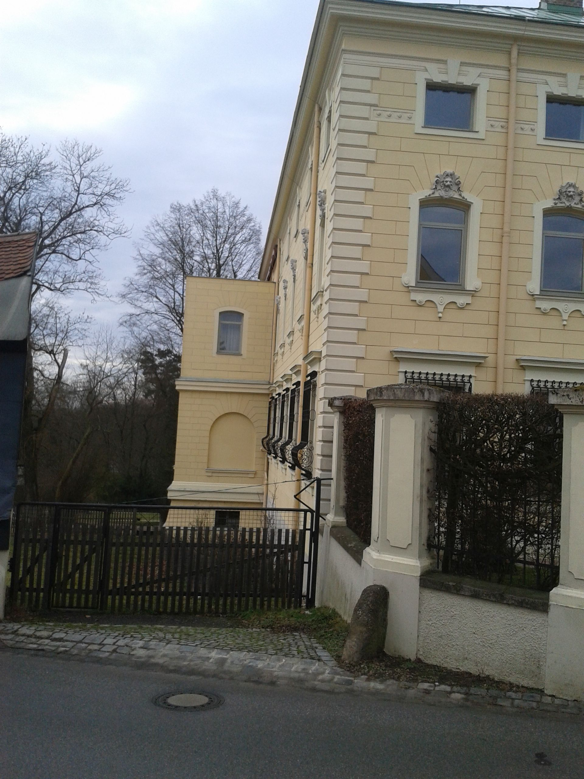 Schoss Leonberg (Leonberg)